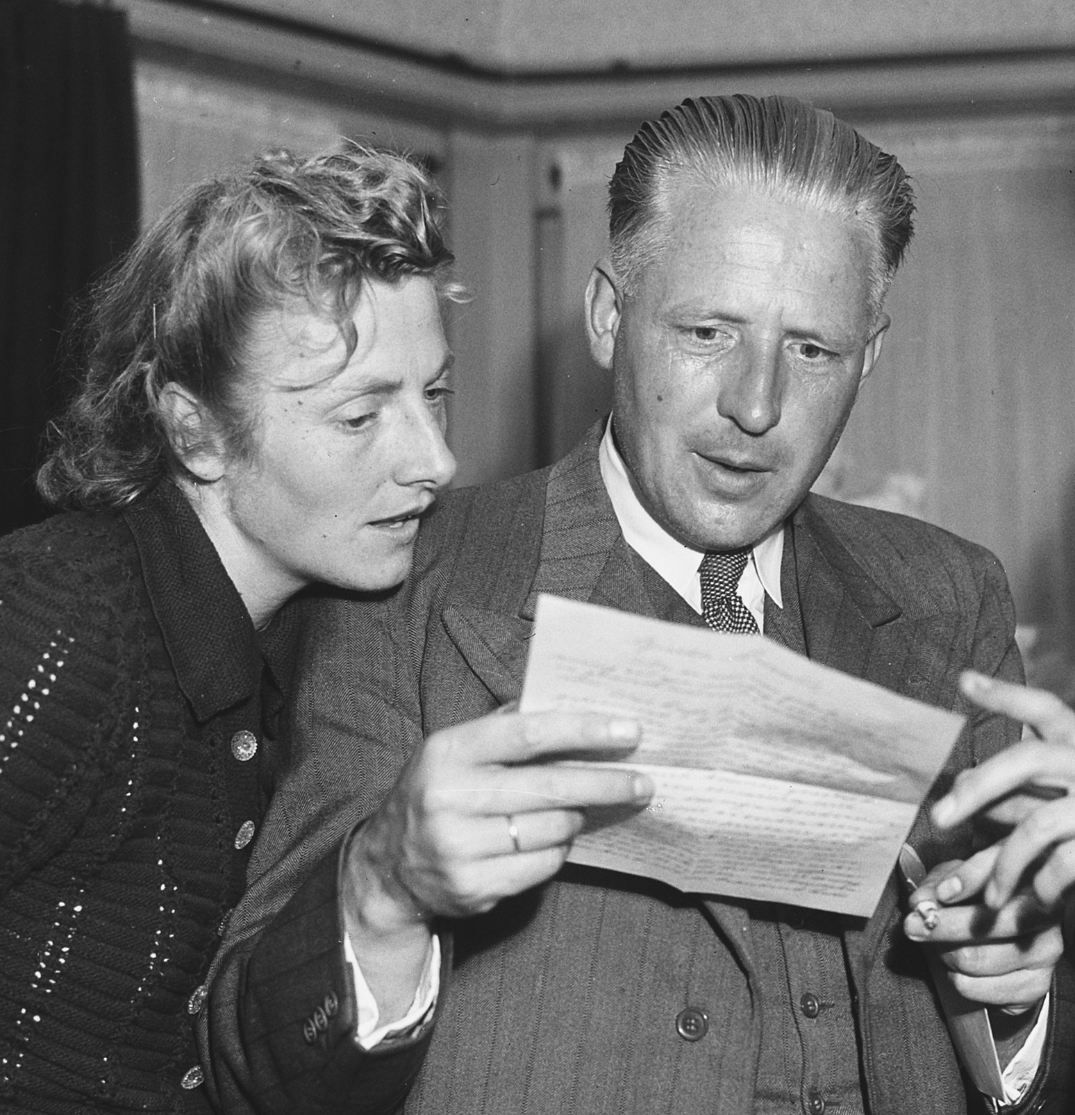 Fanny Blankers-Koen en echtgenoot (midden) lezen de post